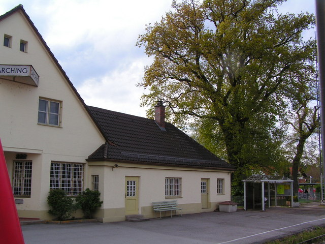 Bahnhof Garching an der Alz, 14 km from Alt?ng, Deutschland (Zone 33).